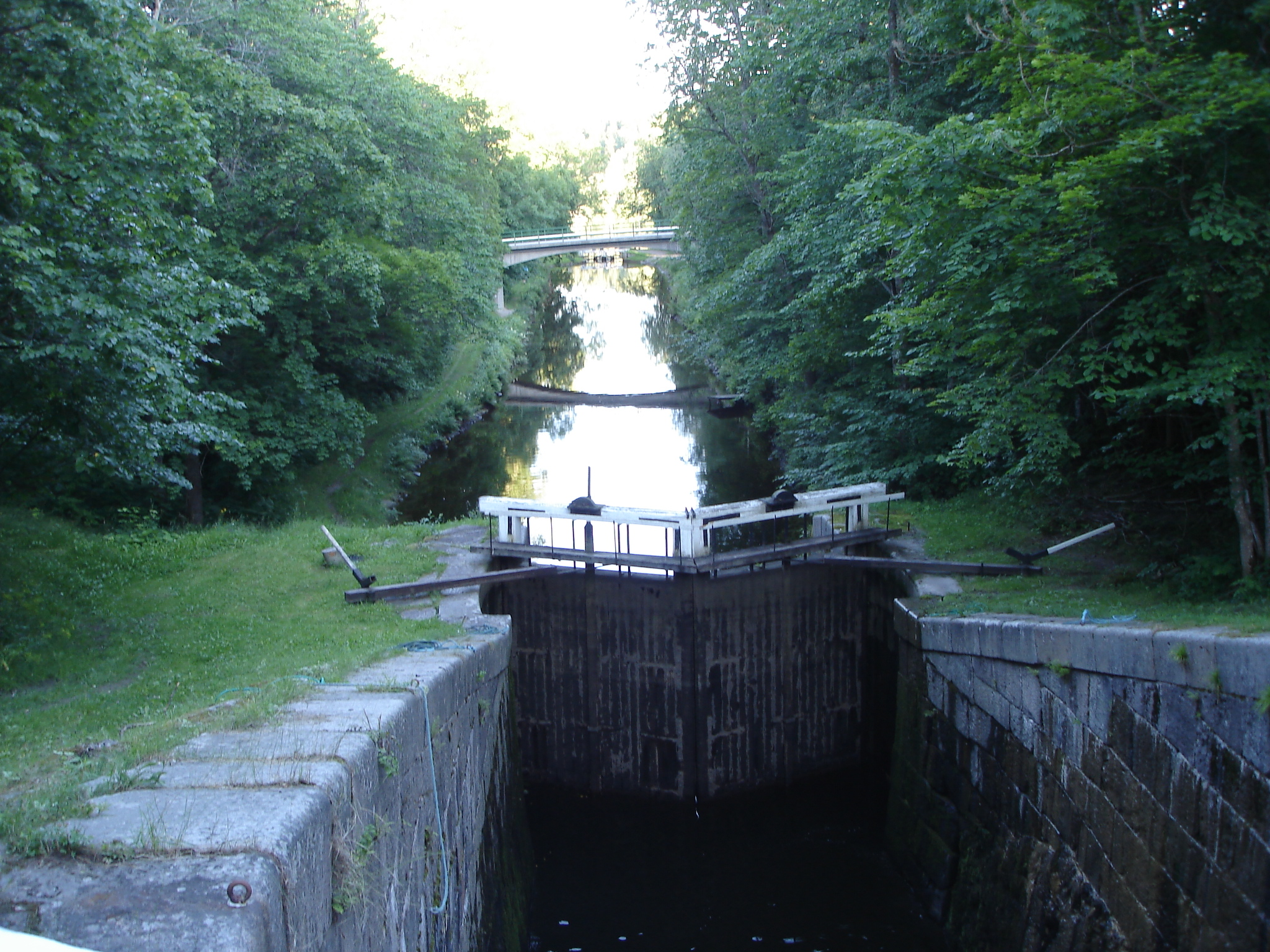 Strömsholms kanals dubbelsluss i Semlaområdet.